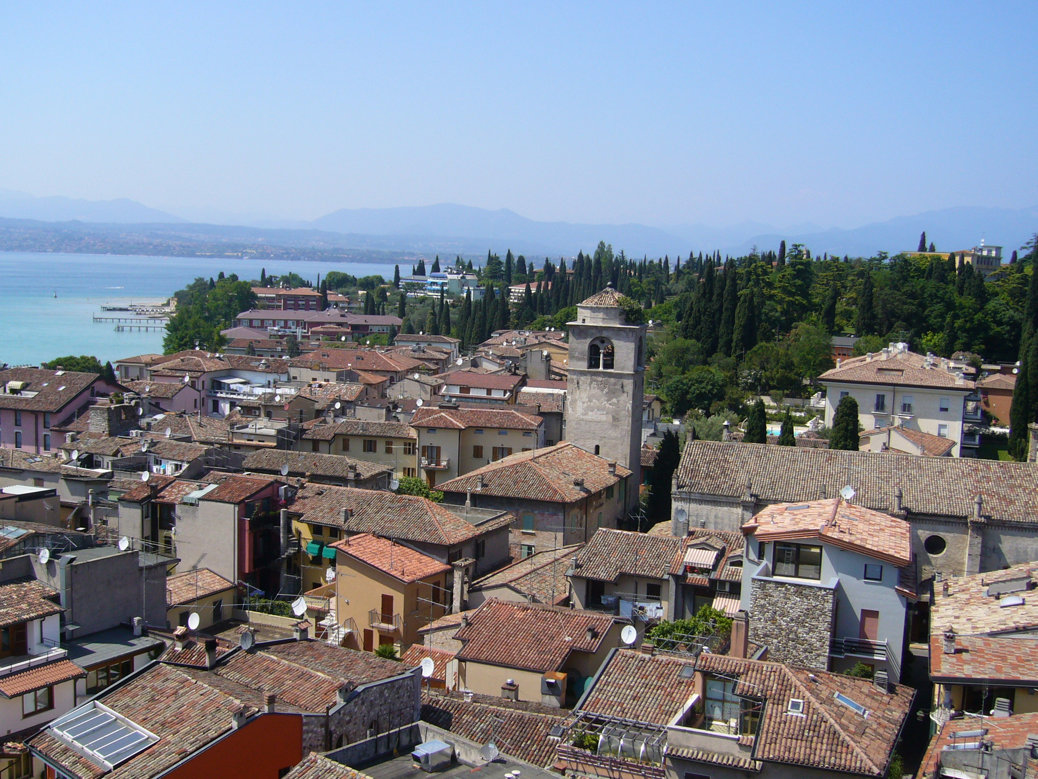 Borgo di Sirmione dal castello scaligero